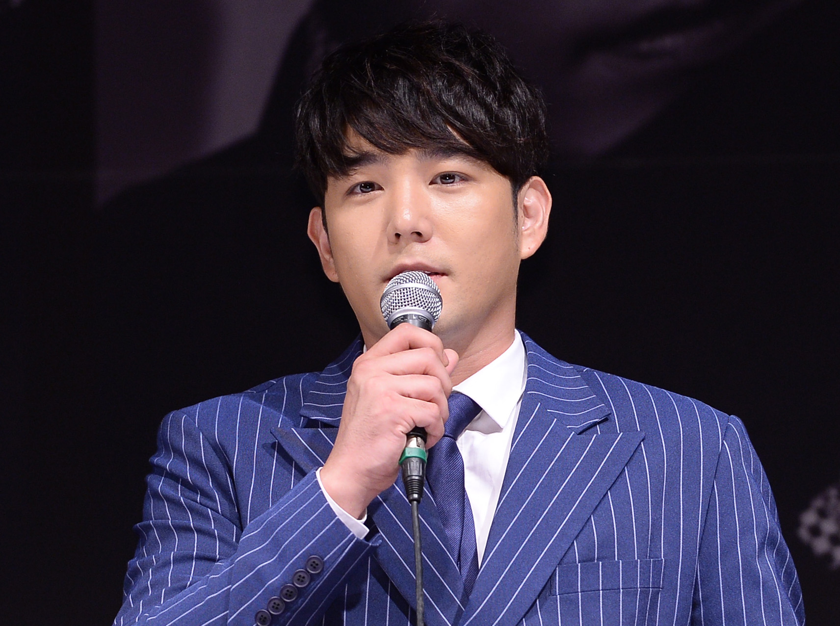 슈퍼주니어 멤버들이 15일 오후 서울 강남구 삼성동 코엑스 아티움에서 열린 스페셜 앨범 'Devil' 발매 기념 기자회견에서 인사를 하고 있다. 2015.07.15 / 이석우 기자